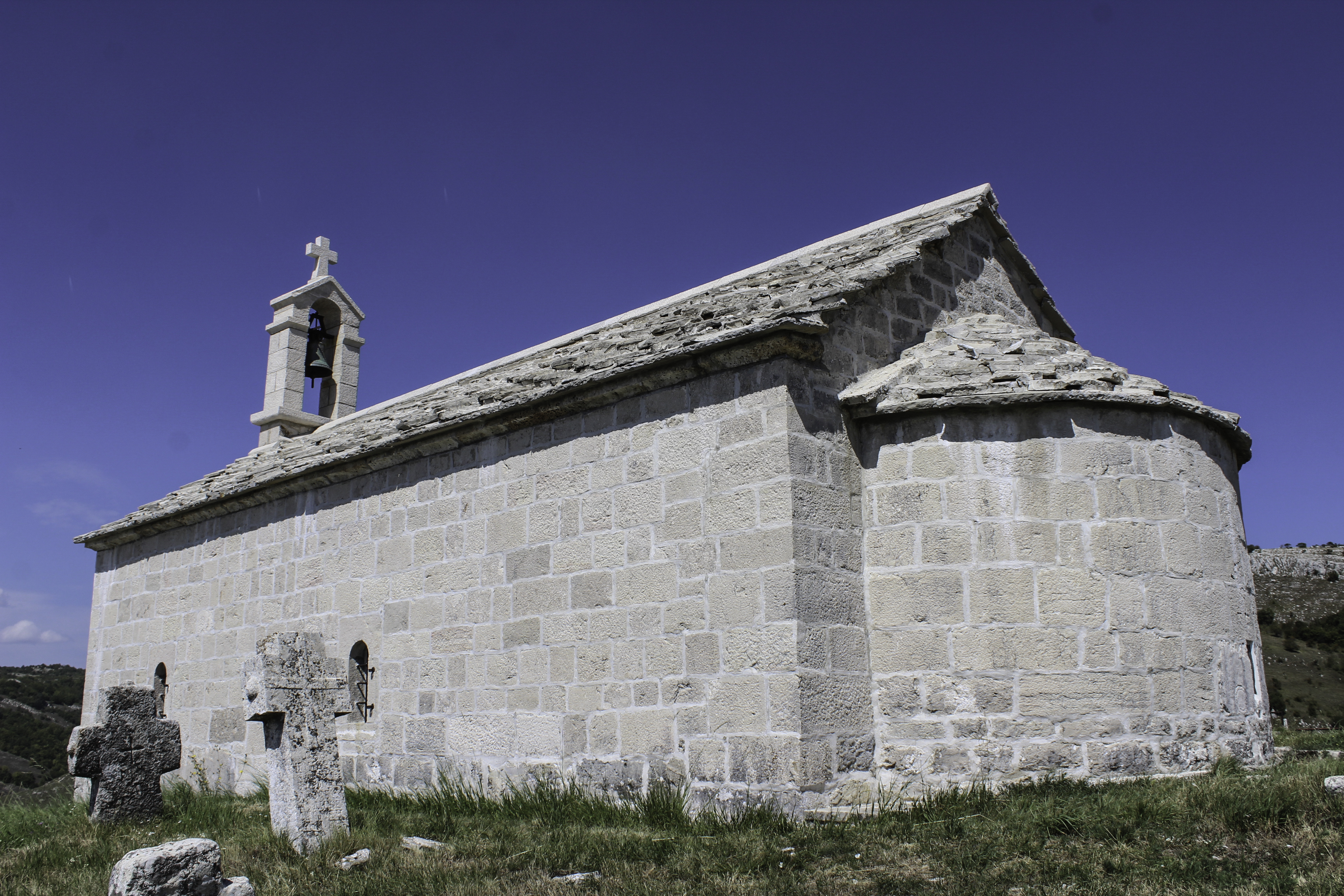 Српски (ћирилица): This image was uploaded as part of Trace of Soul 2018. Црква Светог Николе, Грачаница (Гацко).